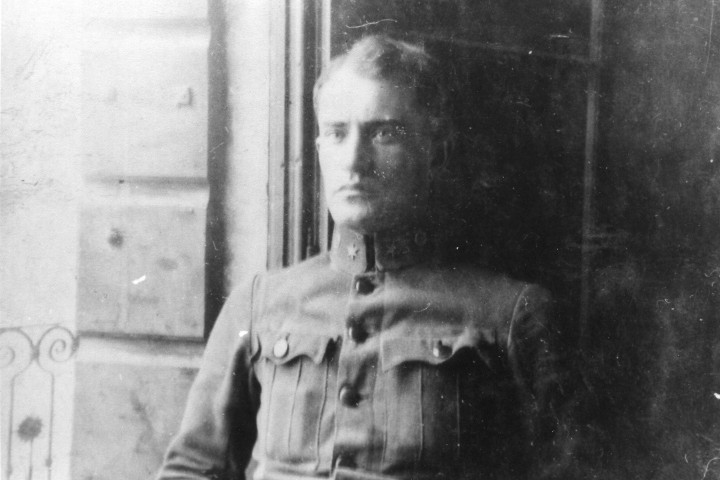 фото Григорія Стецюка під час служби в австрійській армії під час 1 світової війни